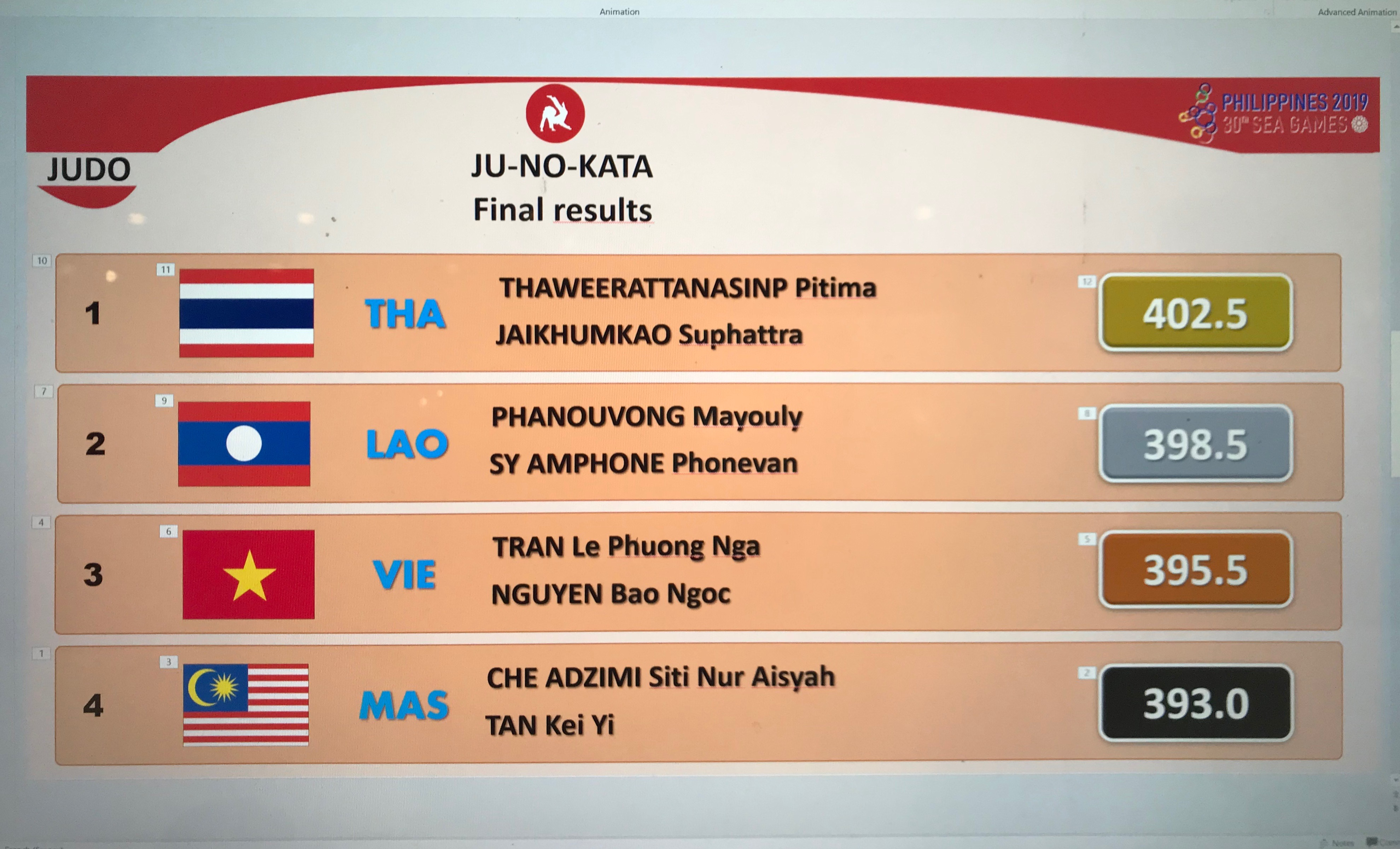 柔の形 決勝成績